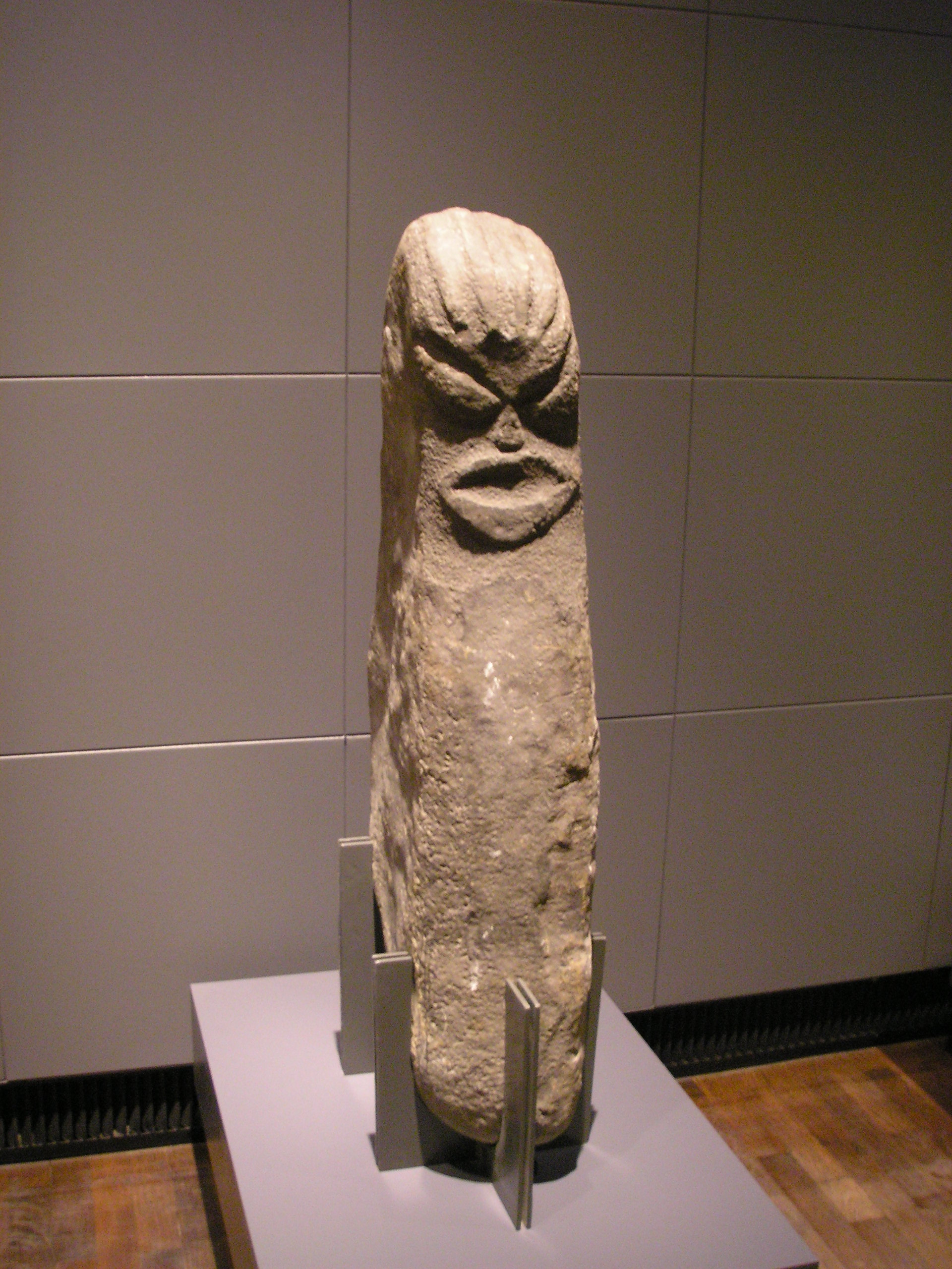 Figure of stone. From Hawaiʻi, Collection Arning, 1887. Located in the Ethnologisches Museum, Berlin-Dahlem. DE: "Steinfigur, Hawaiʻi. Slg. Arning, 1887" (Objektbeschreibung in der Ausstellung, Stand: 2006-09-15)